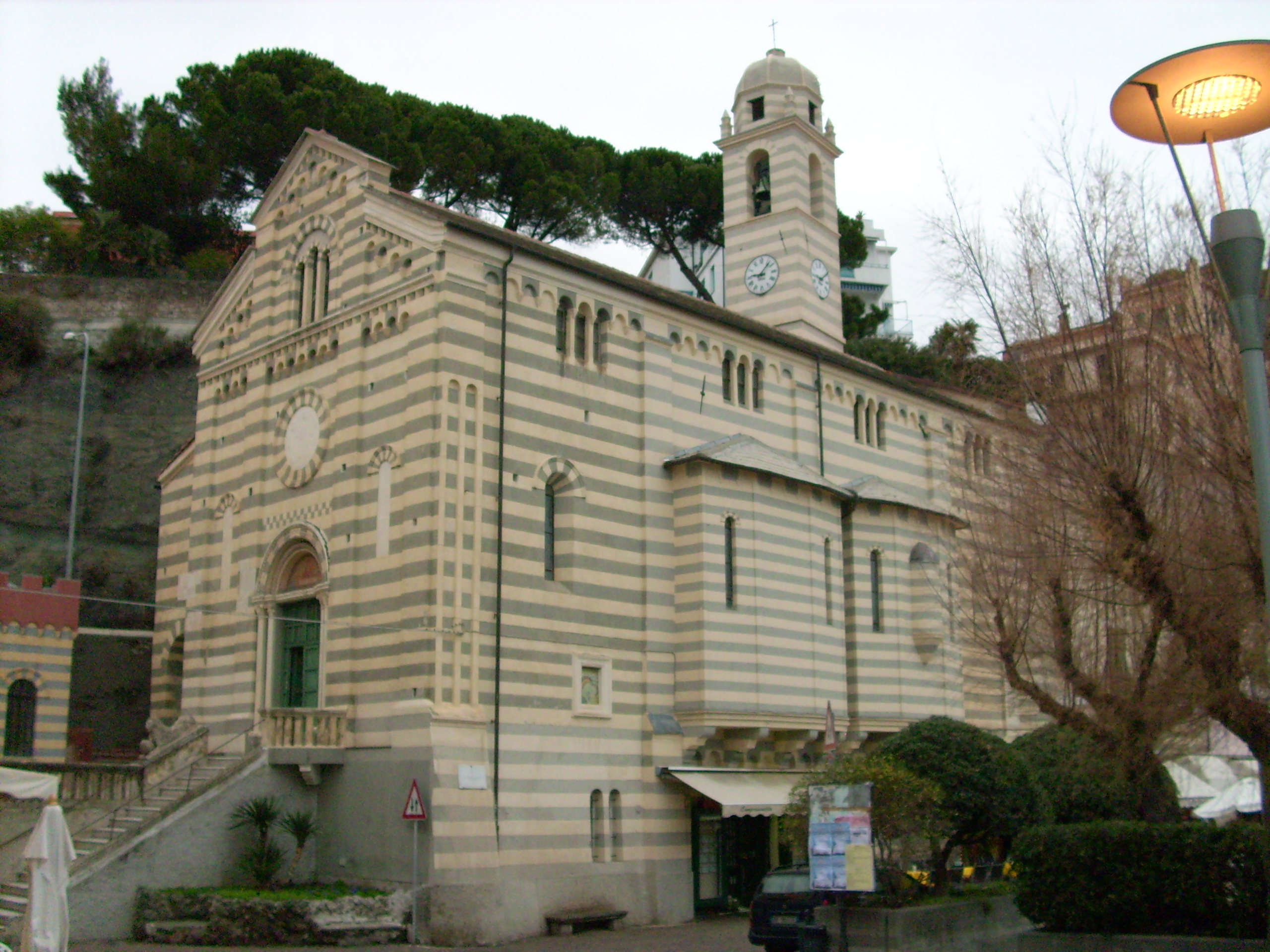 Chiesa della Consolazione di Celle Ligure, Liguria, Italy